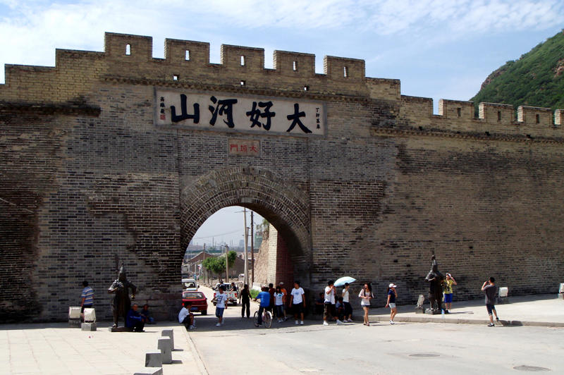 河北省张家口市境内的长城关隘大境门。